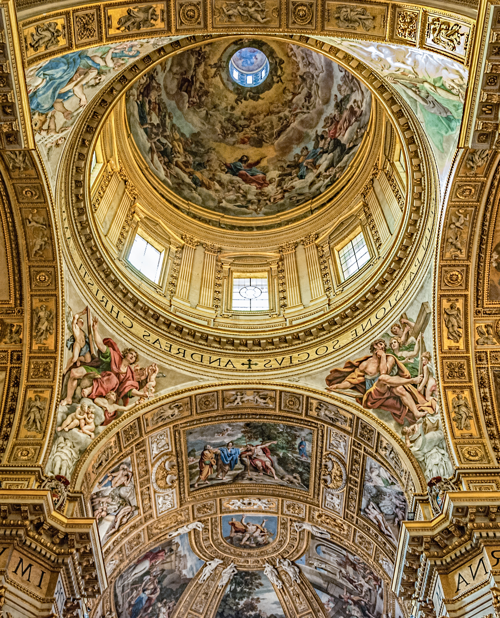 Basilica di Santa Andrea Della Valle, Rome